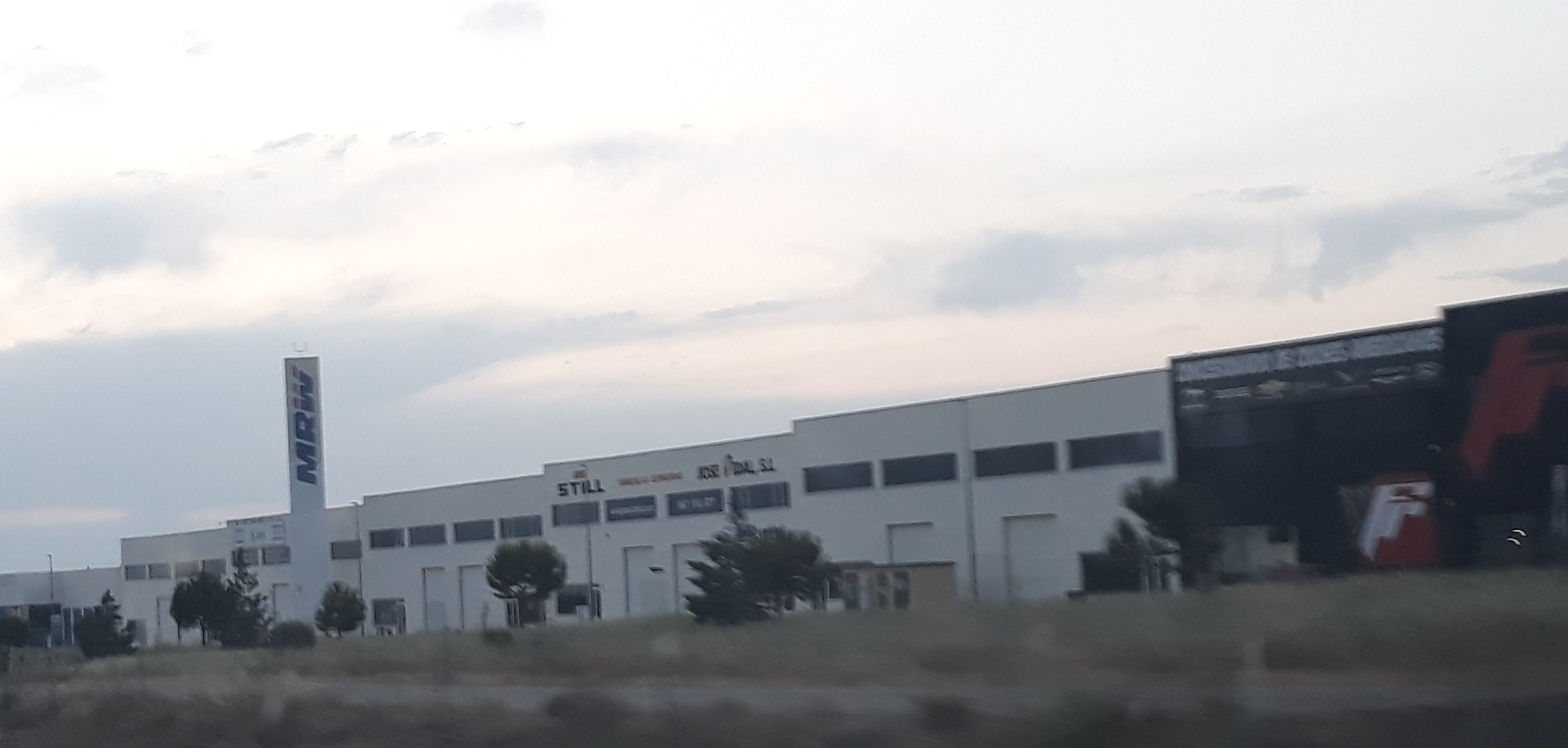 Polígono Industrial Camporrosso, Albacete.